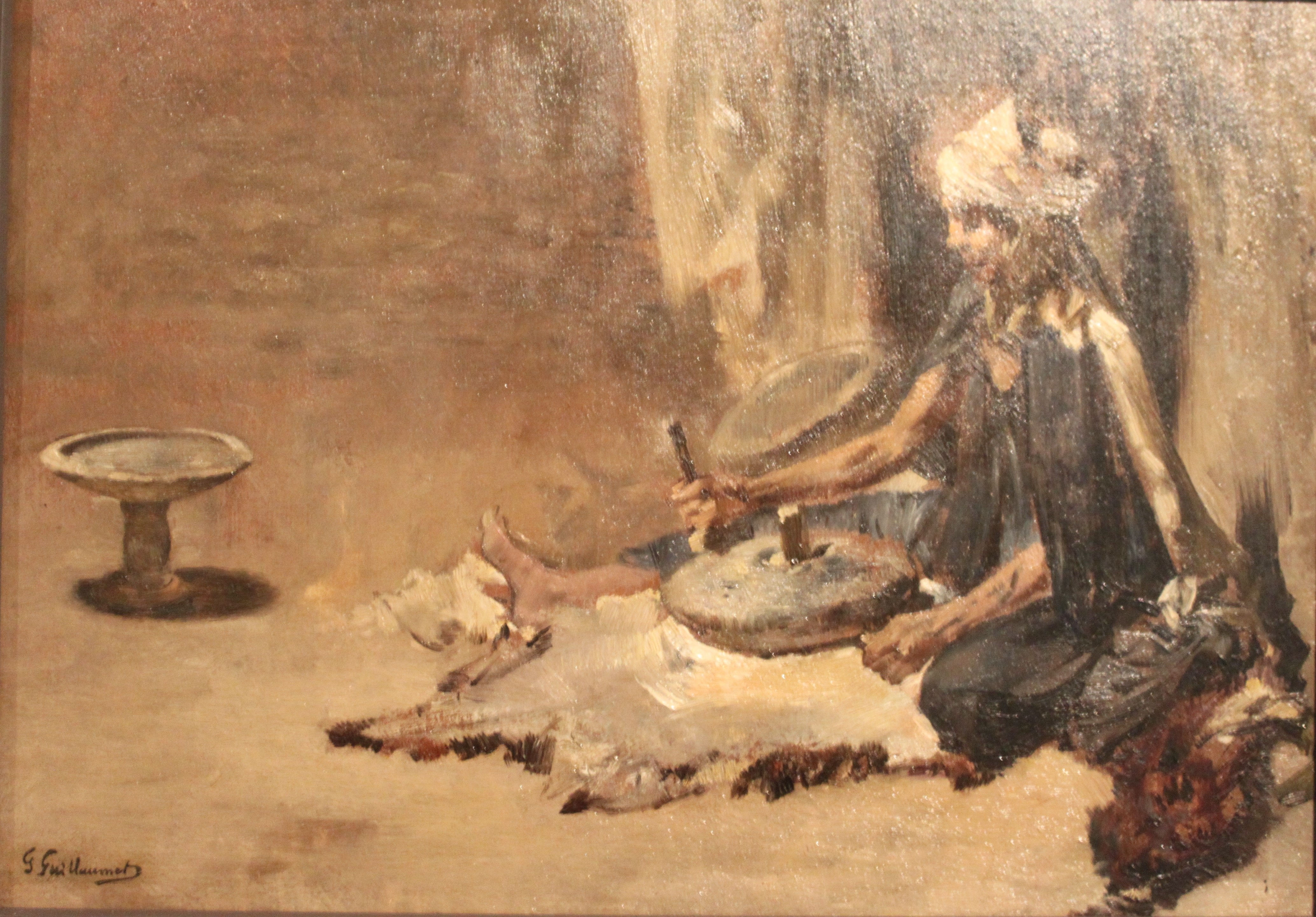 Femme arabe préparant le couscous - 1881-1882 - Gustave Guillaumet - Huile sur toile - Musée du quai Branly - Inv. 75.3095 C - Acquisition par le Musée de la France d'Outre-mer en 1937.